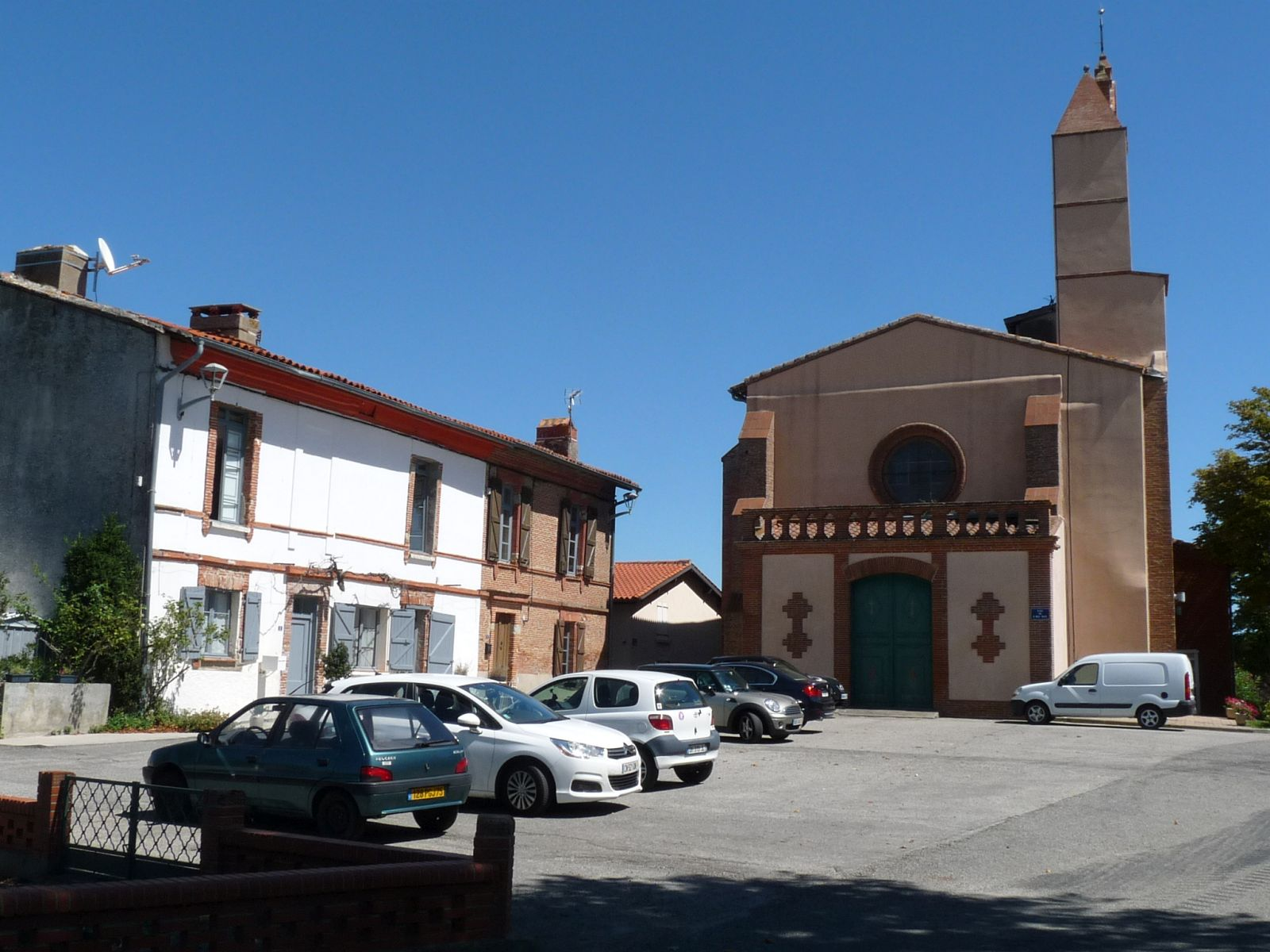 Place de l'église, Aignes, Haute-Garonne, France